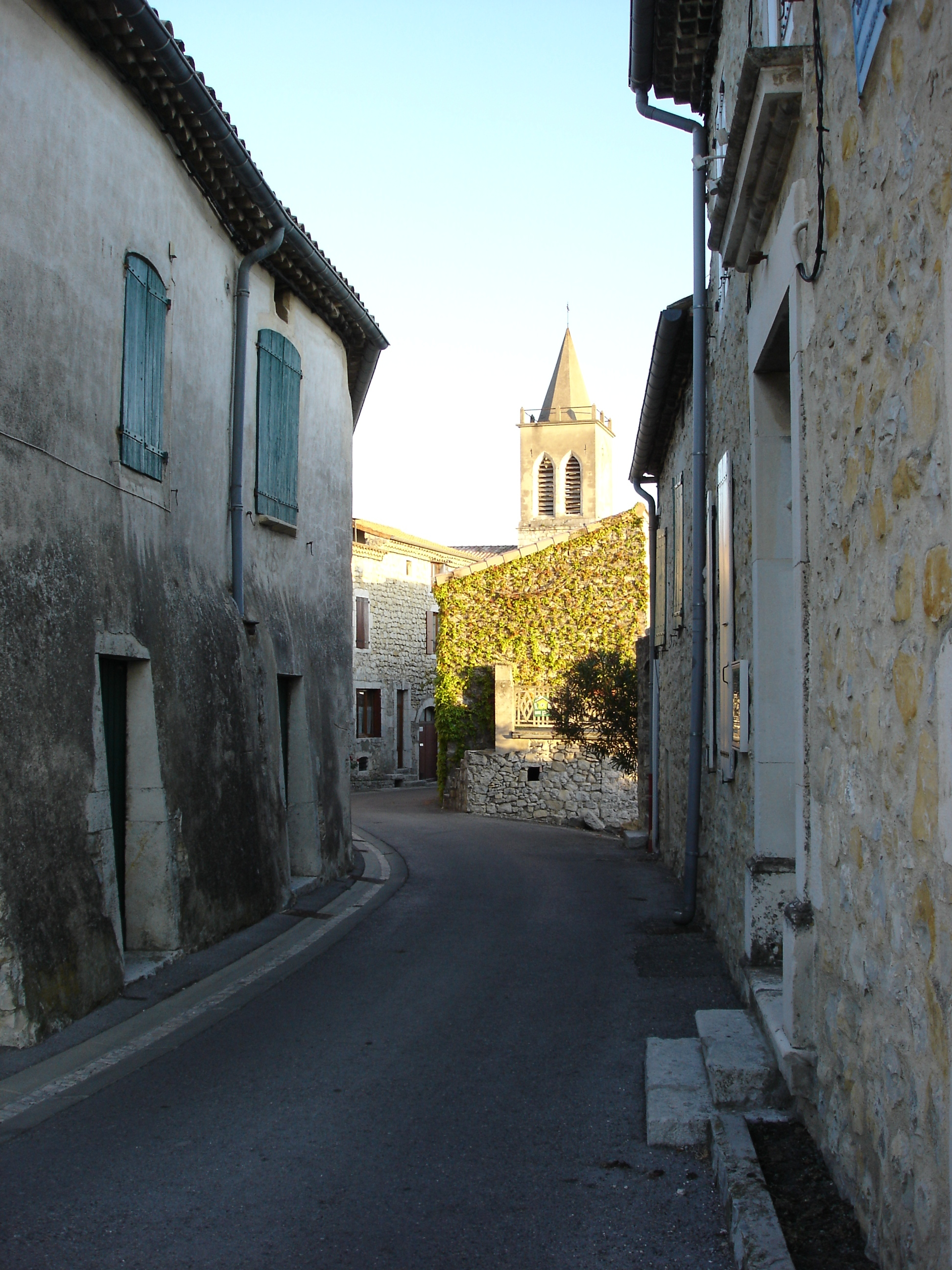 Rue de Saint-Andéol-de-Berg en Ardèche